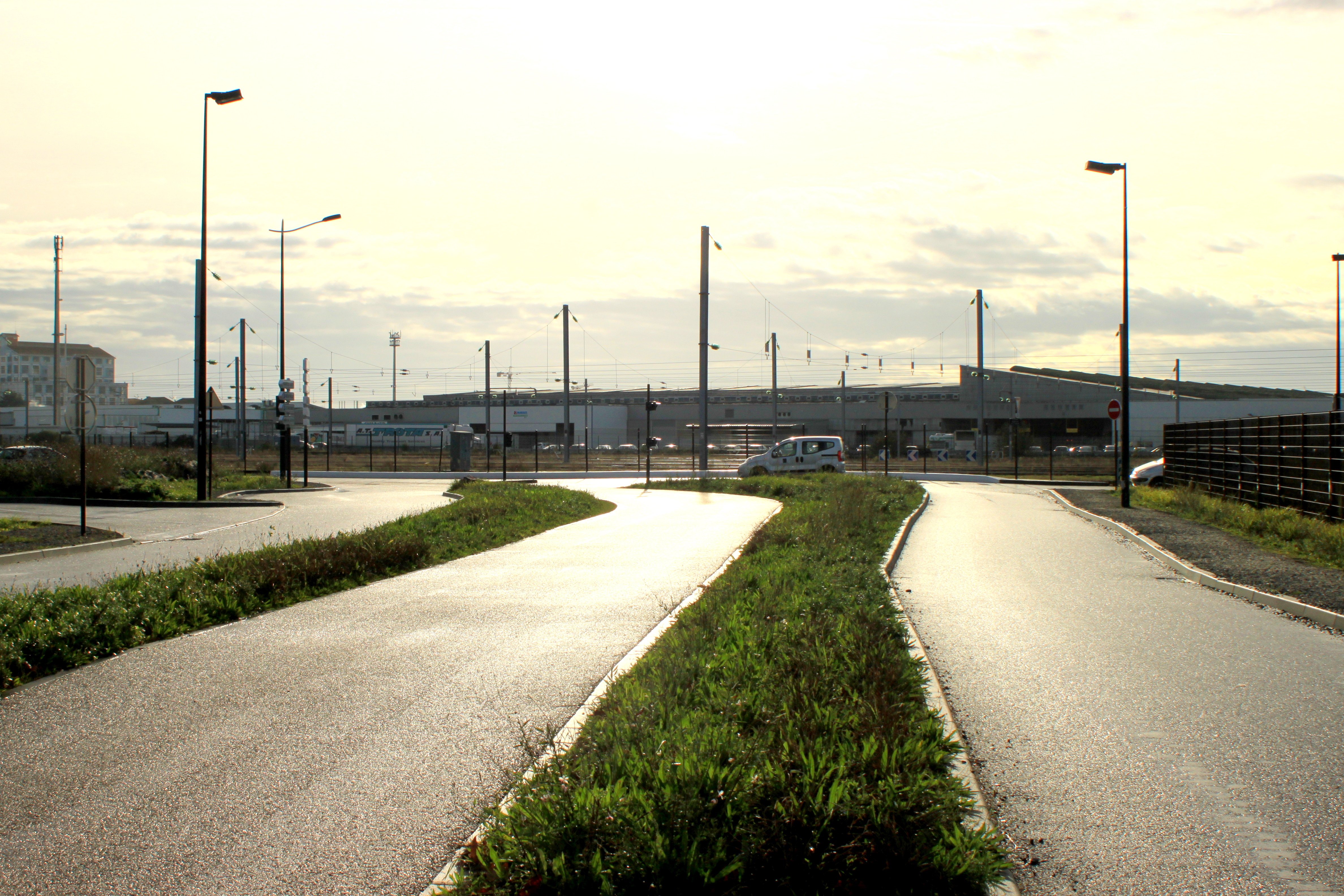 Boulevard Léon-Bureau, Fr-44-Nantes.